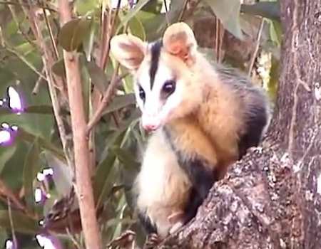 Otra zarigueya subida al tronco, pero esta es más rojiza